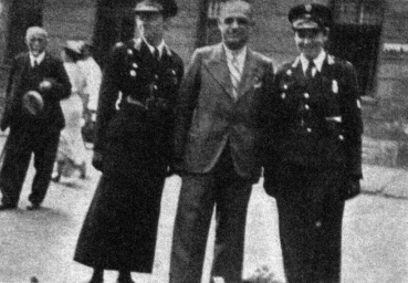 Esperantisto Léon Agourtine kun du policistoj. Originala priskribo: Samideano Agourtine, ĵurnalisto el Paris, kiu deziris esti arestata de la du kunfotografitaj samideanoj-policistoj dum la kongreso en Varsovio. Antaŭ la Universala Kongreso okazis kurso kun policistoj, en kiu ankaŭ tiuj du simpatiaj samideanoj partoprenis.